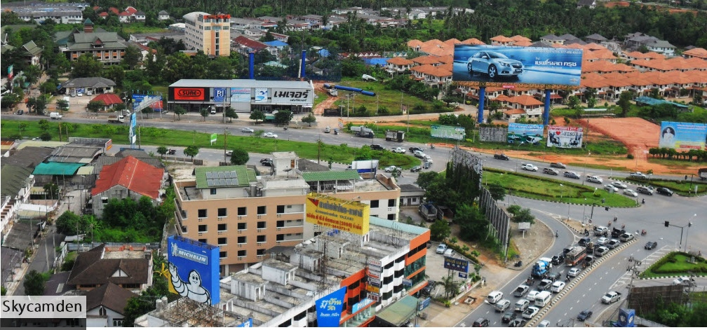 สี่แยกท่ากูบ